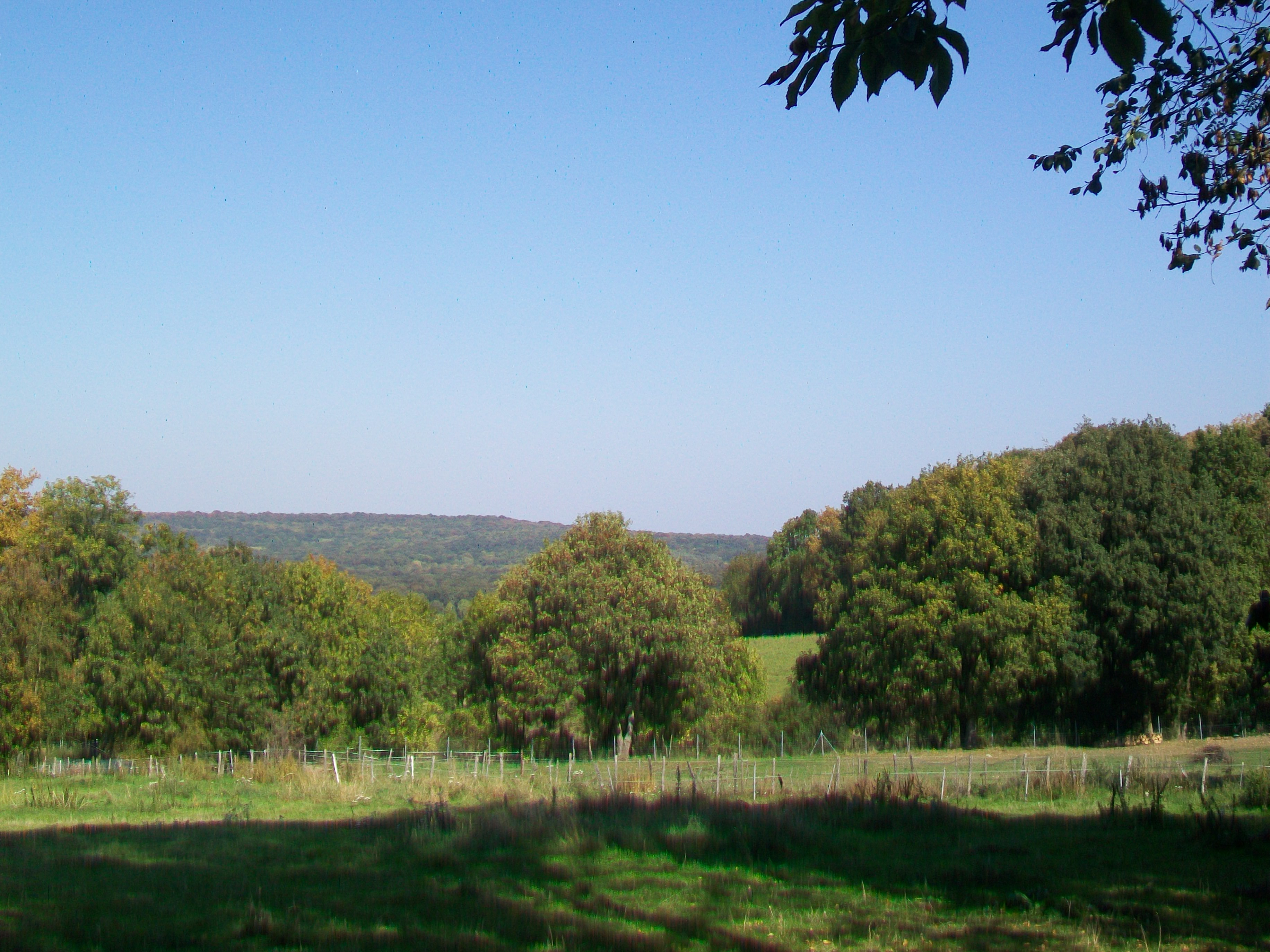 Vue sur la forêt de l'Isle-Adam depuis la rue de la Croix Frileuse (voie communale n° 3) à Béthemont-la-Forêt.